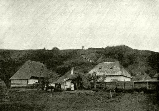 MAGYAR TÖRTÉNETI ÉLETRAJZOK MÁRKI SÁNDOR DÓSA GYÖRGY 1470-1514 A MAGYAR TUDOMÁNYOS AKADÉMIA SEGÉLYEZÉSÉVEL KIADJA A MAGYAR TÖRTÉNELMI TÁRSULAT SZERKESZTI DR. DÉZSI LAJOS BUDAPEST AZ ATHENAEUM R.-T. KÖNYVNYOMDÁJA 1913